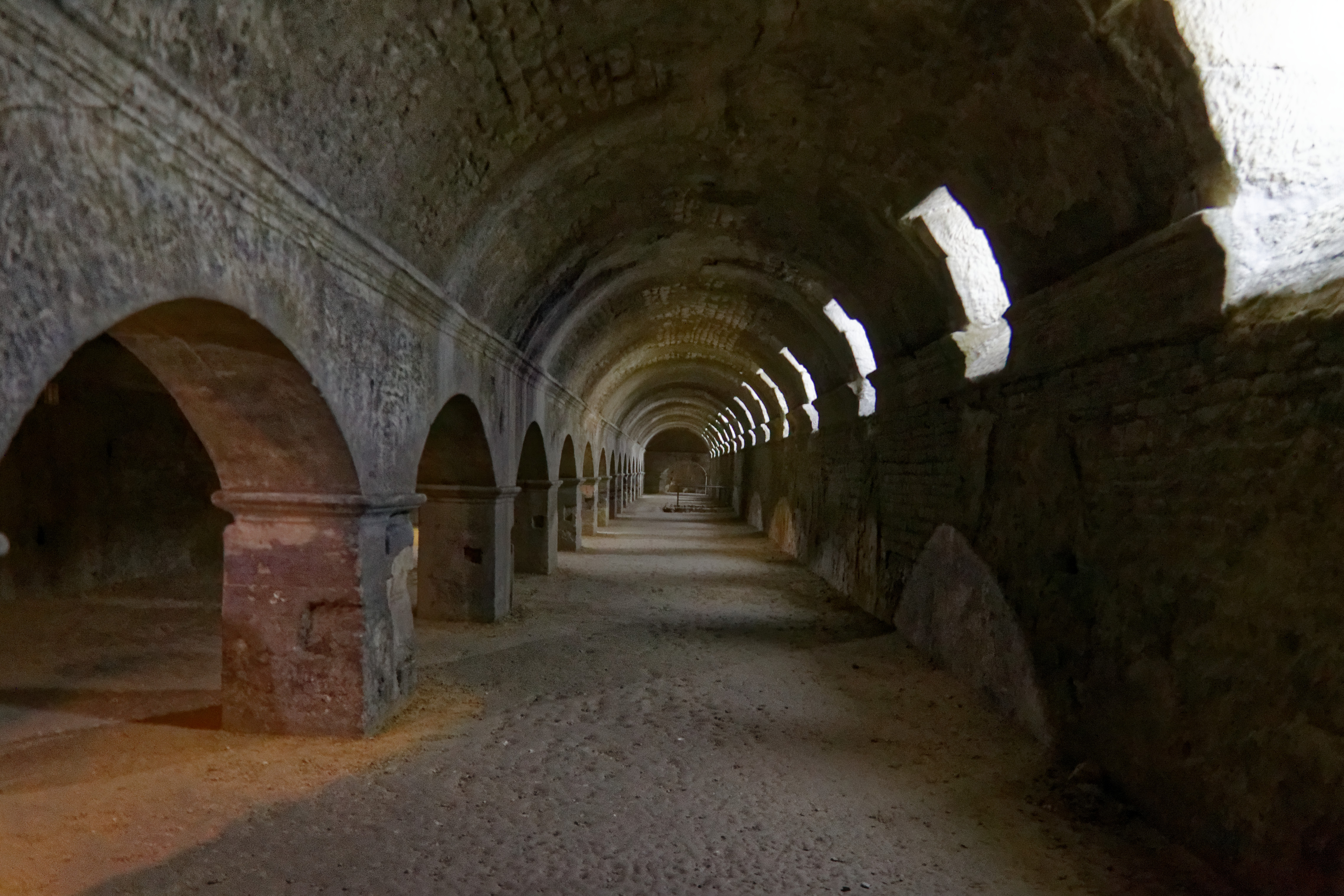 Kryptoportikus des römischen Forums in Arles, Südflügel nach Westen gesehen